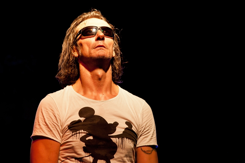 Davor Gobac i Psihomodo pop